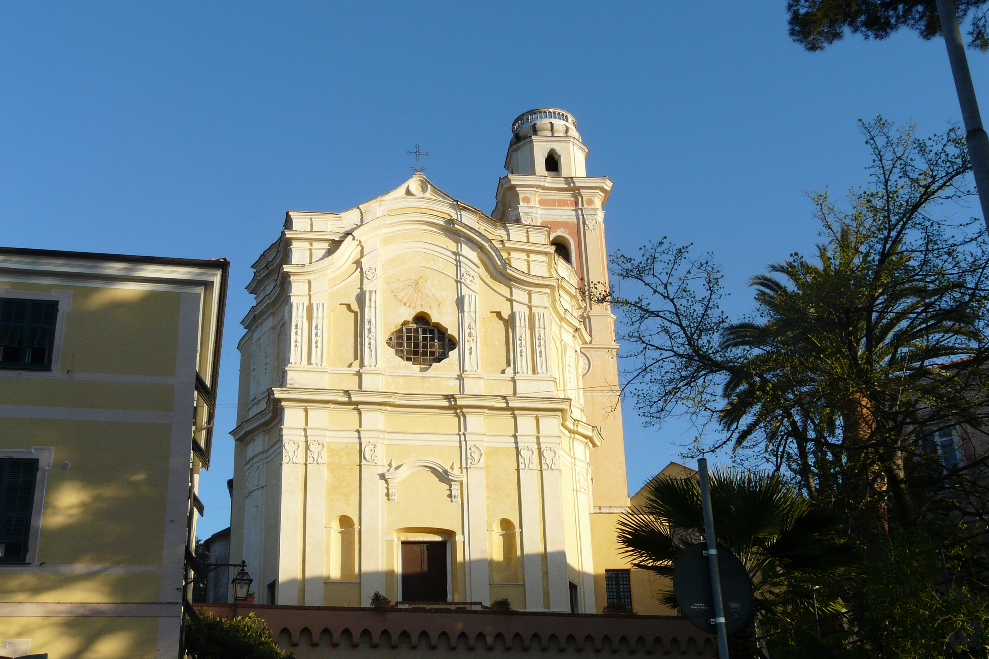 Chiesa parrocchiale di San Nicolò di Bari, Diano Castello, Liguria, Italia